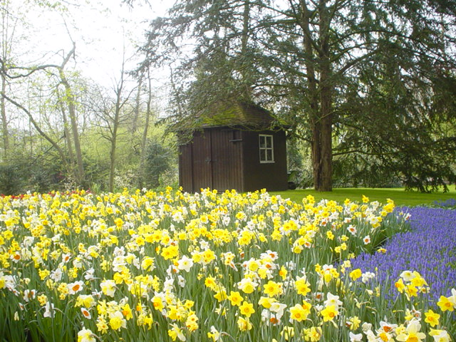 Kuekenhof